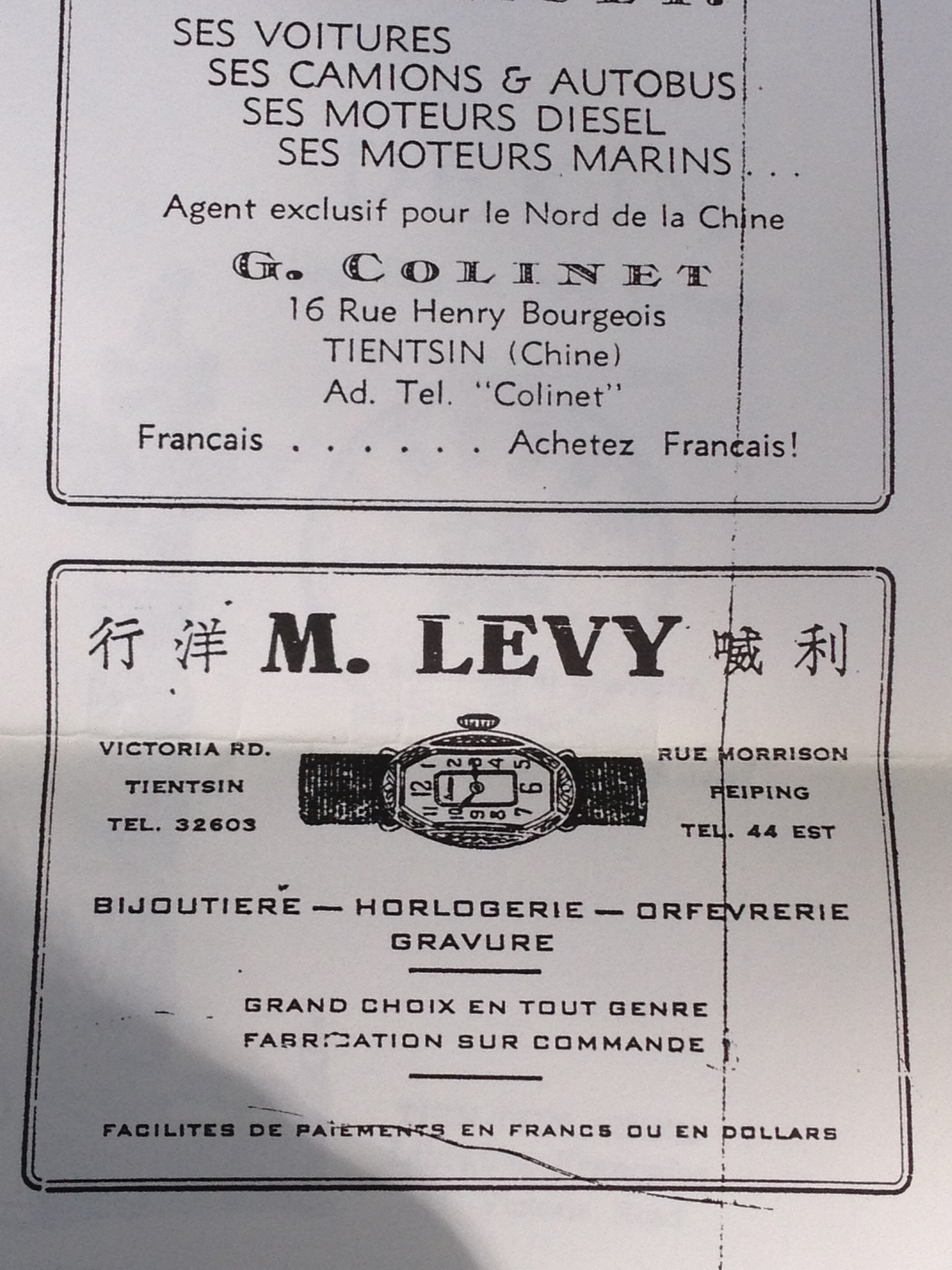 Annonce relative au magasin d'horlogerie-joaillerie tenu par le père du sinologue André Lévy, Marx Lévy.